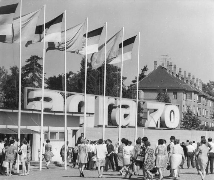 Leipzig, agra 70, Landwirtschaftsausstellung Zentralbild Koch-19.6.70-tr-Leipzig: Blick auf den Eingang der Landwirtschaftsausstellung- Delegationen aus 20 sozialistischen kapitalistischen und Entwicklungsländern waren bis Donnerstag Studiengäste der "agra 70" in Leipzig-Markkleeberg.